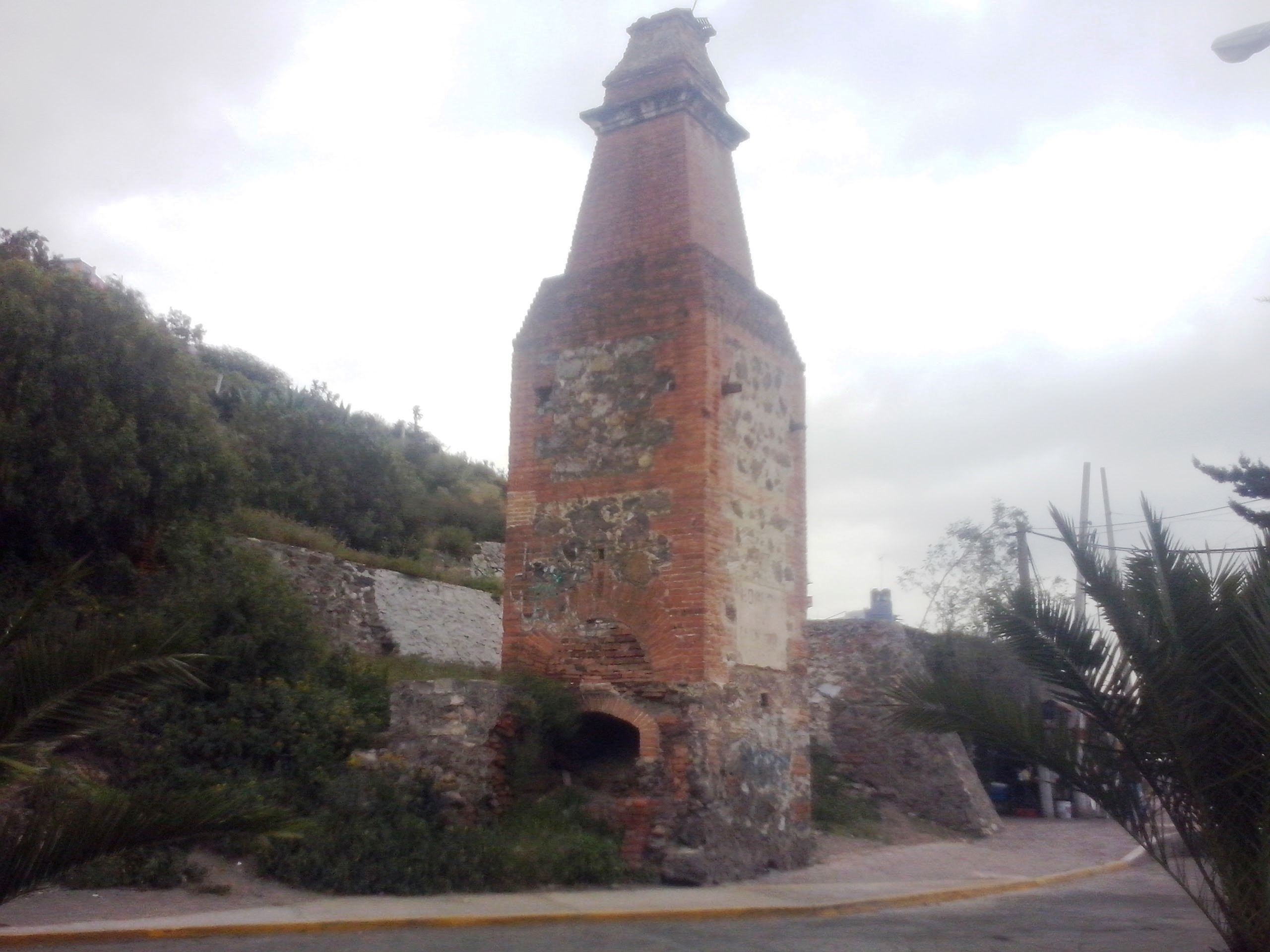 Horno crematorio en Pachuca, México